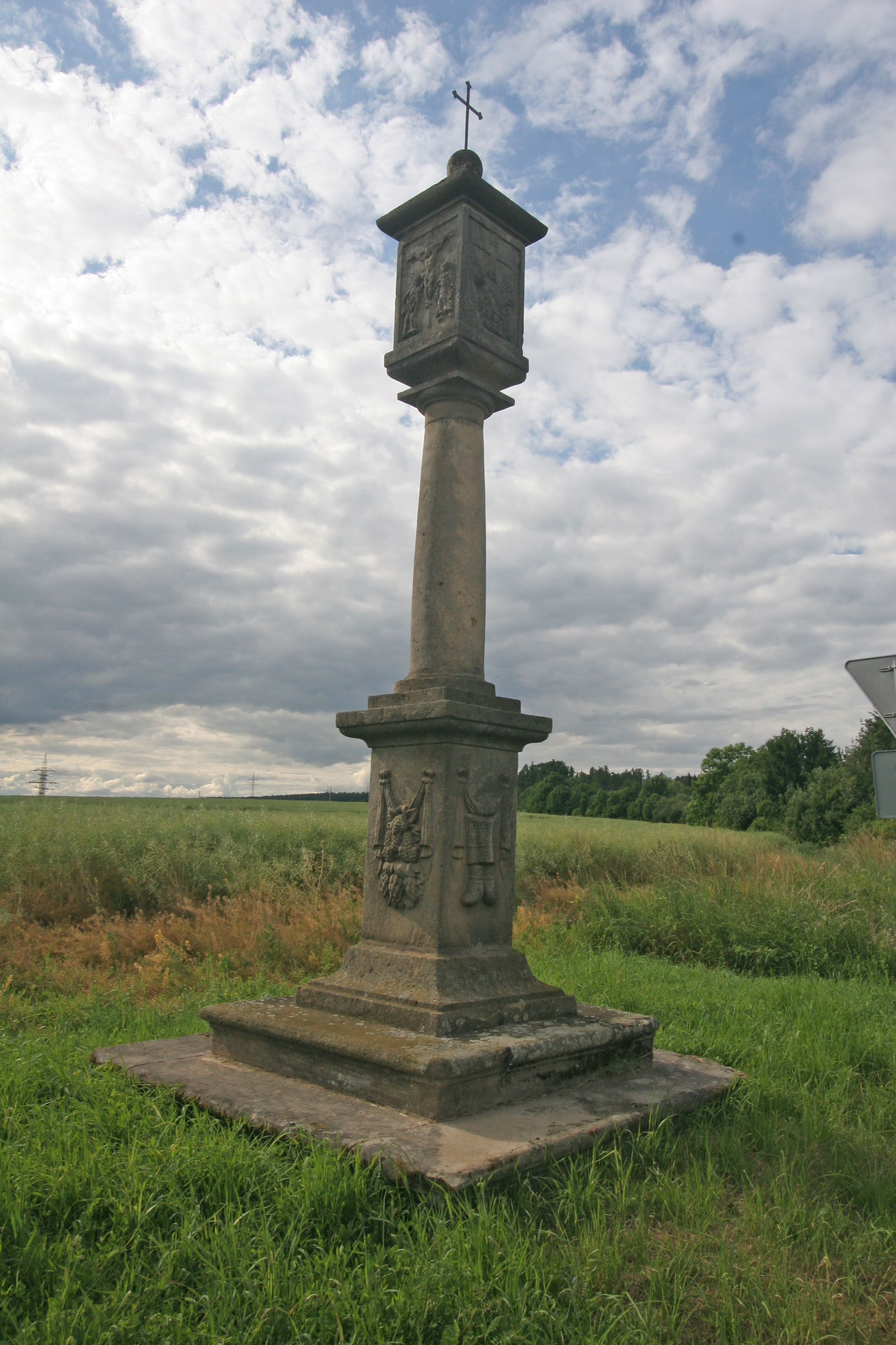 Boží muka, křižovatka na Bílé Poličany